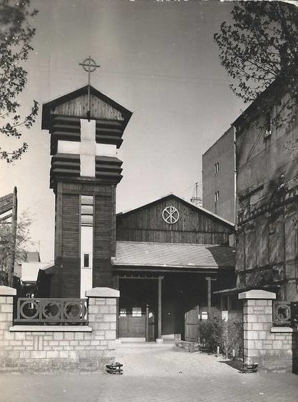 Eglise provisoire de l'Immaculée-Conception de Boulogne-Billancourt. Construite en 1946 et totalement détruite, le 13 juillet 1966, par un incendie dont on ne sait s’il était d’origine accidentelle ou criminelle.